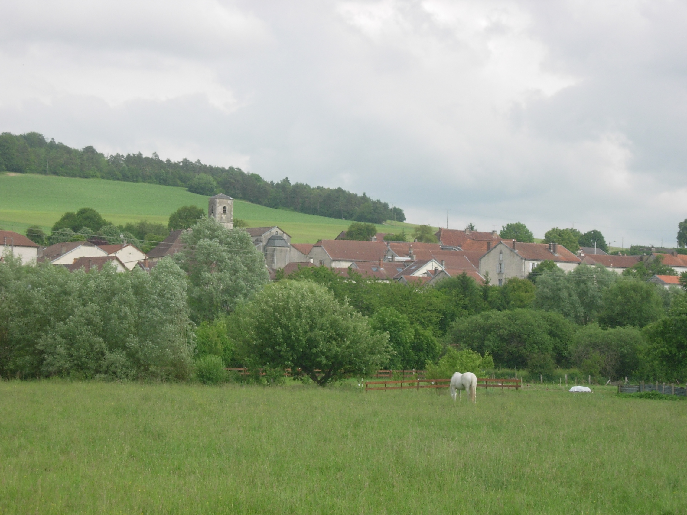 vue générale de Juvancourt